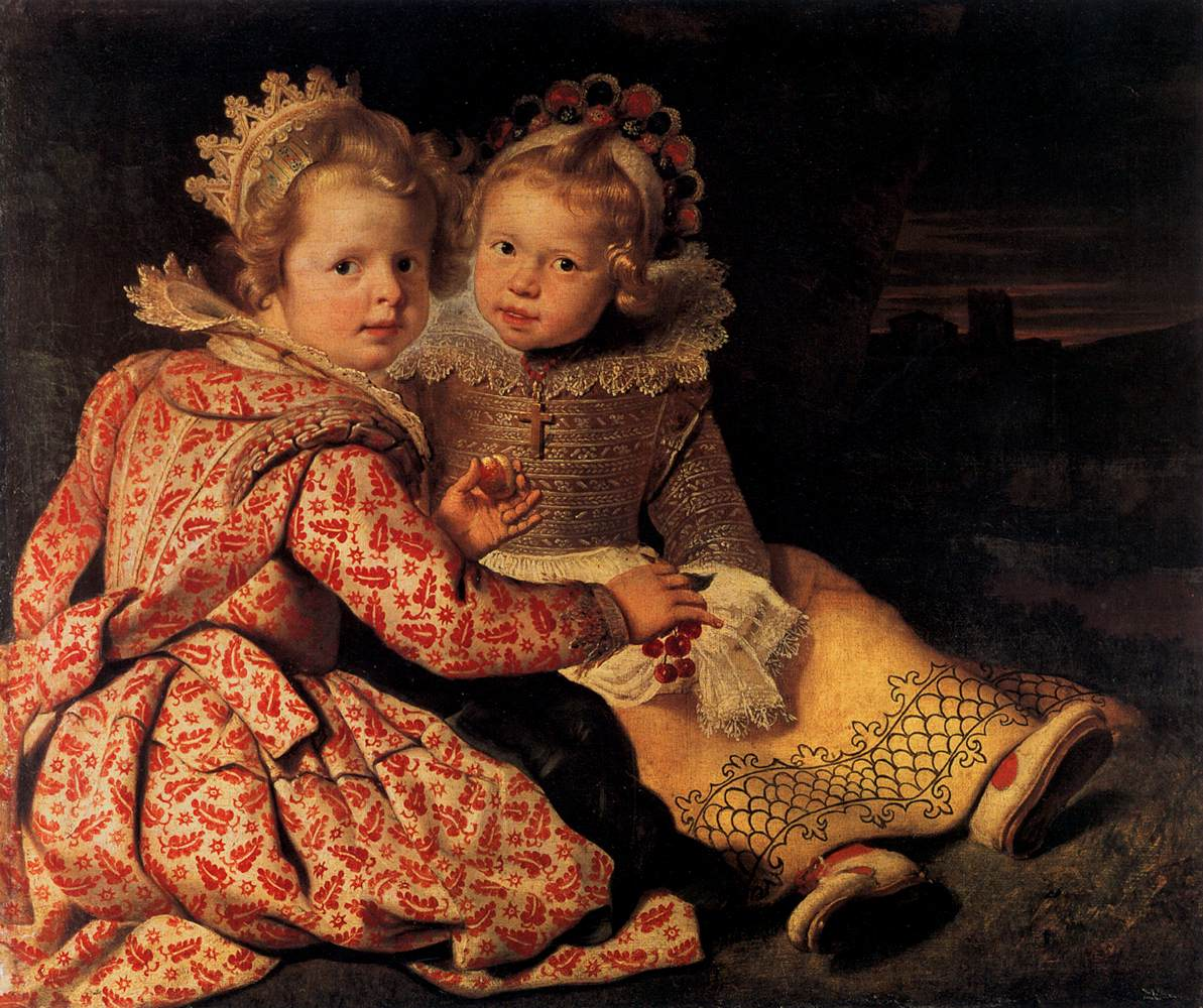 Magdalene (geb. 1618) und Jan Baptist (geb. 1619), die Kinder des Malers